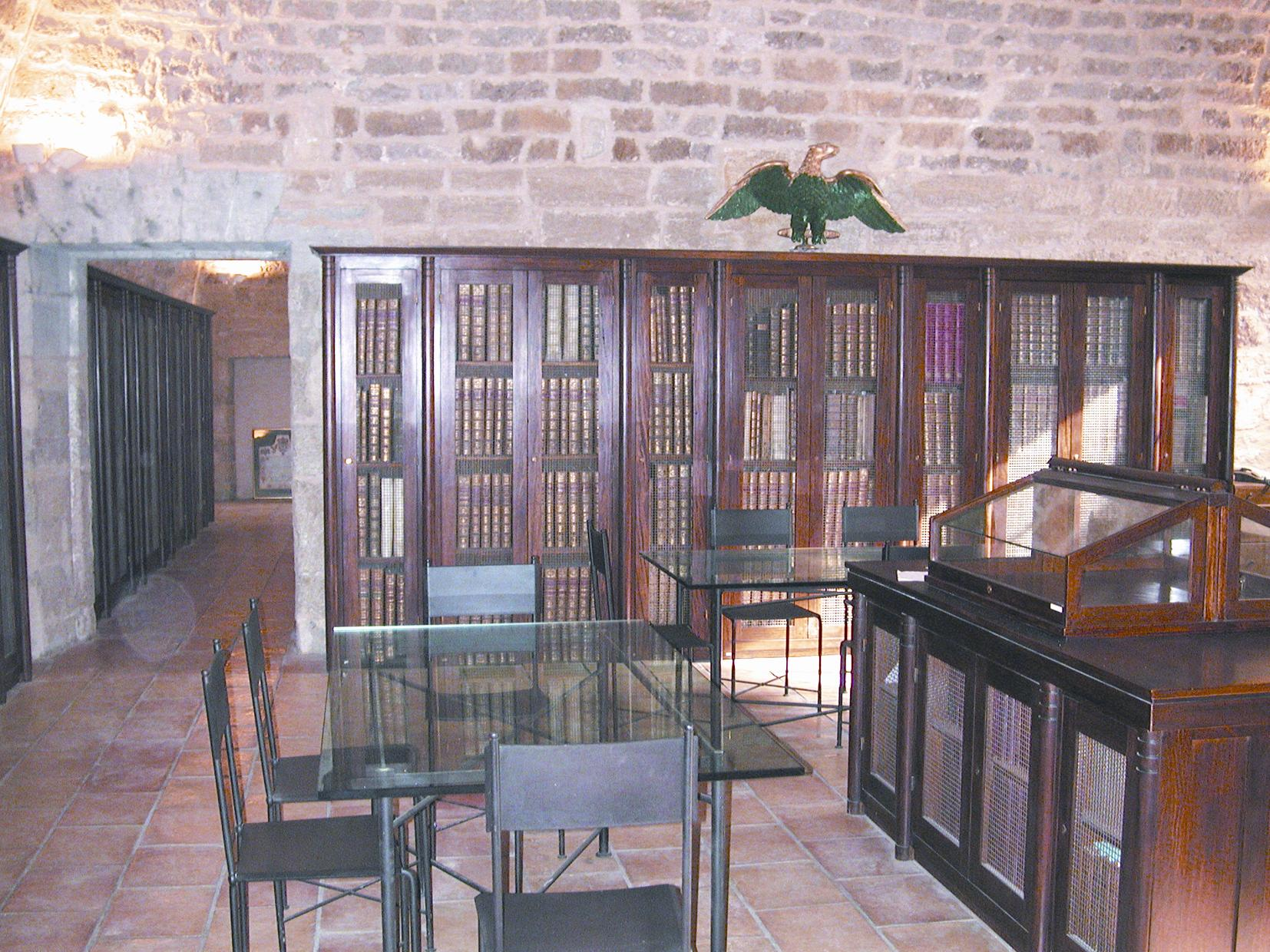 Les collections anciennes de l'UFR Médecine Photographie personnelle prise en juin 2005